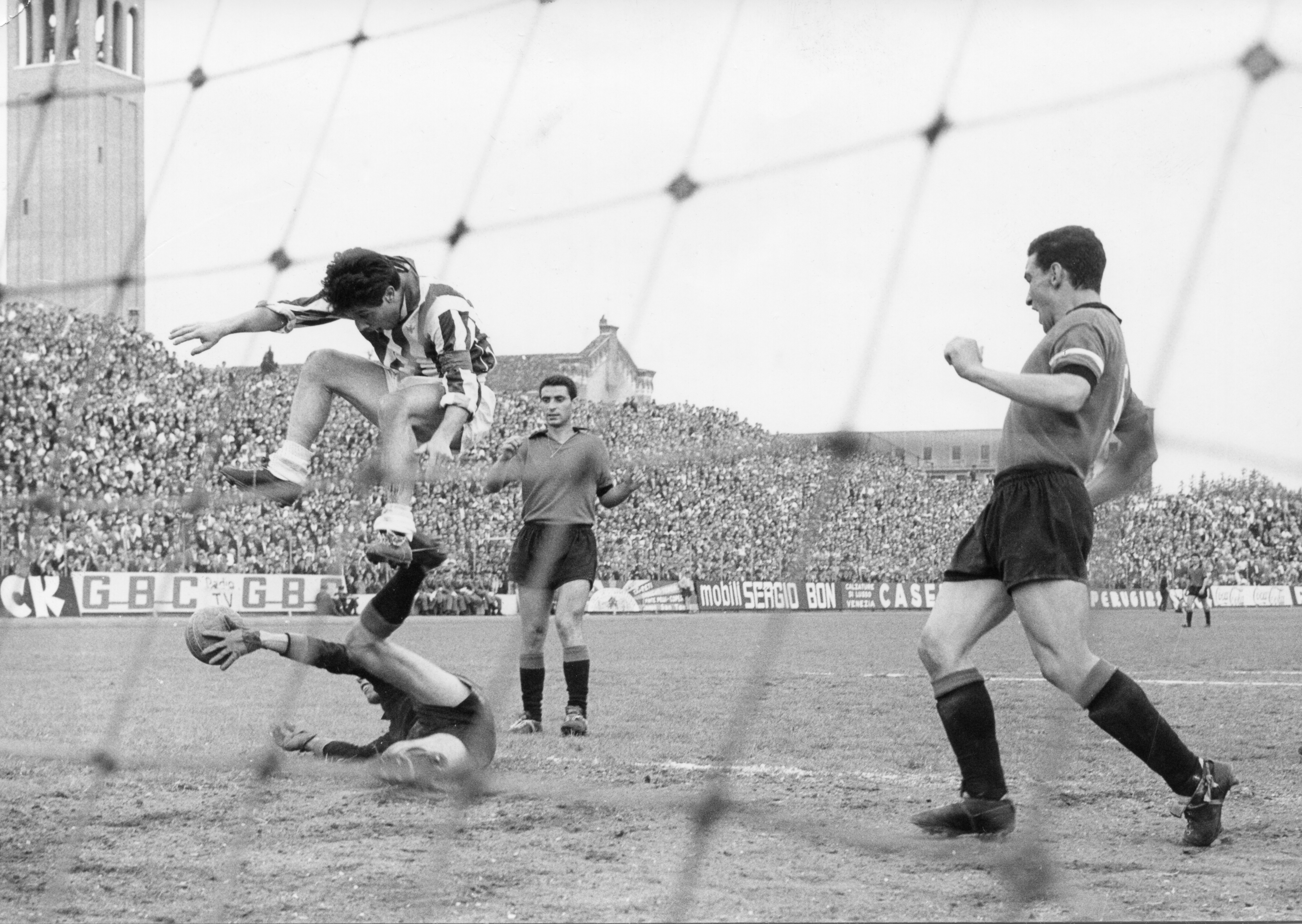 Venezia (Italia), stadio Pierluigi Penzo, 19 maggio 1963. A.C. Venezia v Juventus F.C. 1-2, 33ª giornata del campionato italiano di Serie A 1962-63: parata del portiere veneziano Giovanni Bubacco sull'attaccante juventino Omar Sívori.